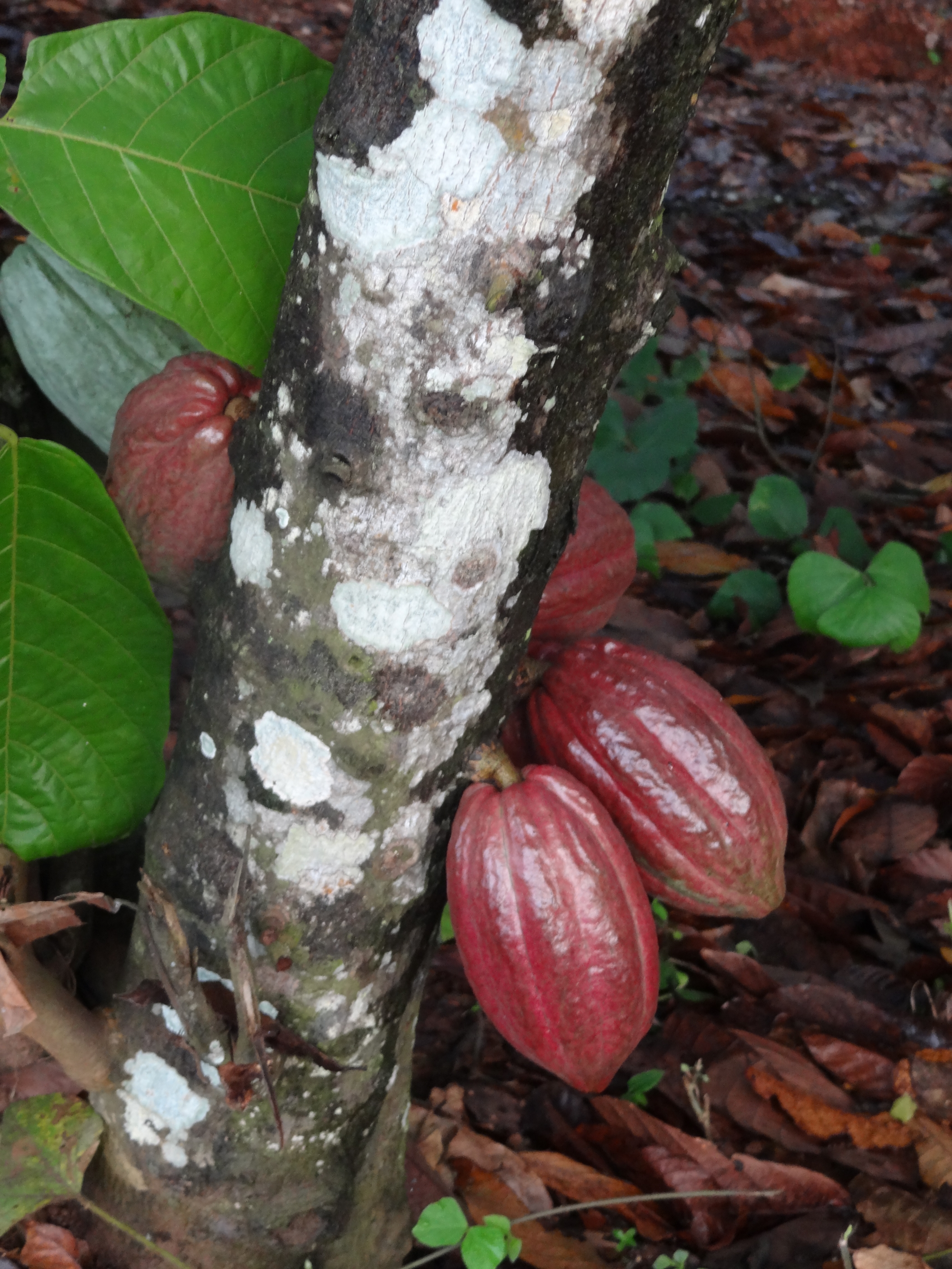 פירות עץ הקקאו בצבעים שונים במטע קקאו בחוף השנהב בין פואקה לבונדוקו This is an image of food from Ivory Coast